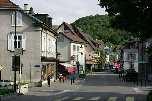 Hauptstrasse in Aesch